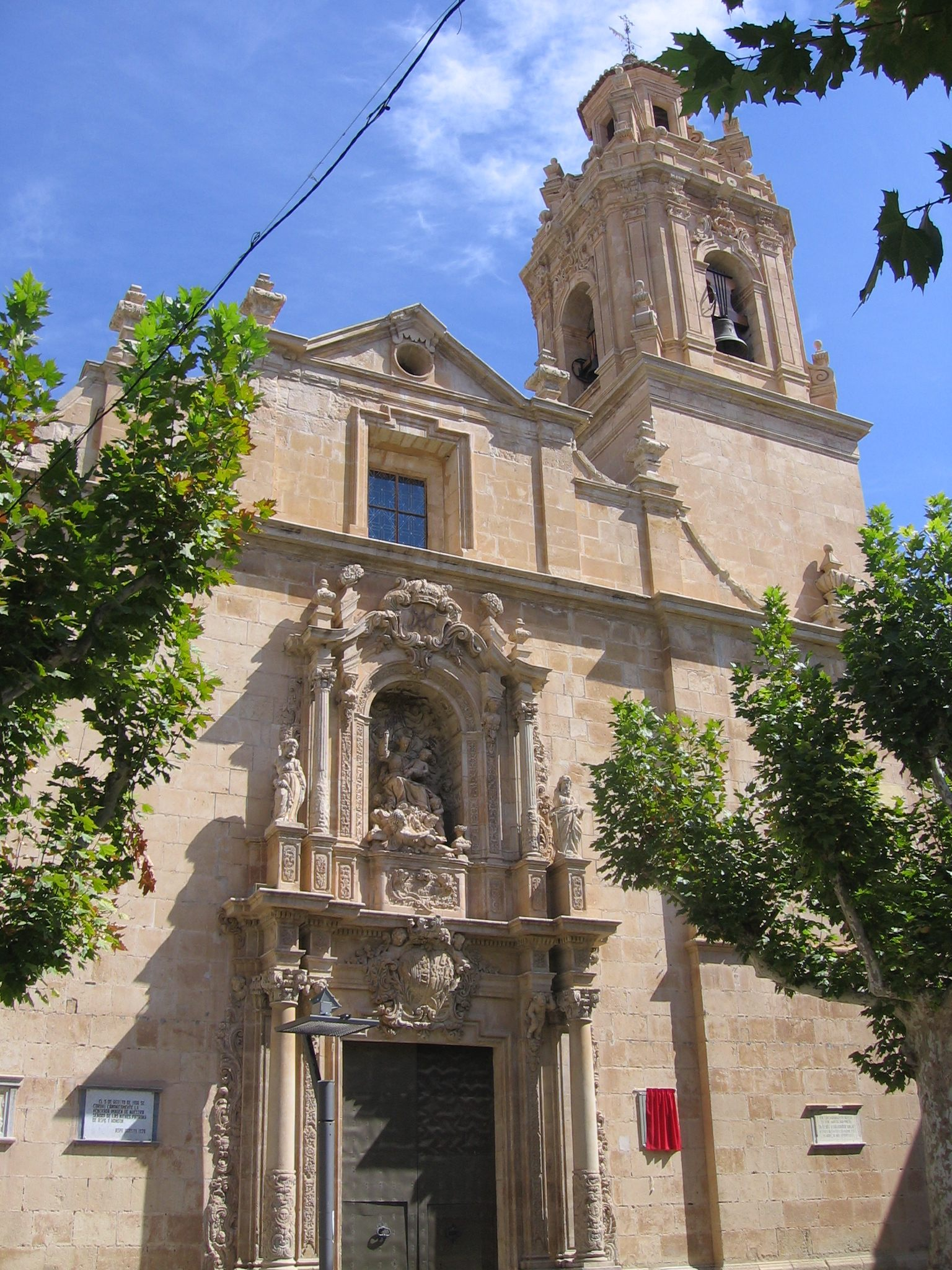 Fotografía de la Basílica de Nuestra Señora del Socorro, en Aspe (Alicante).